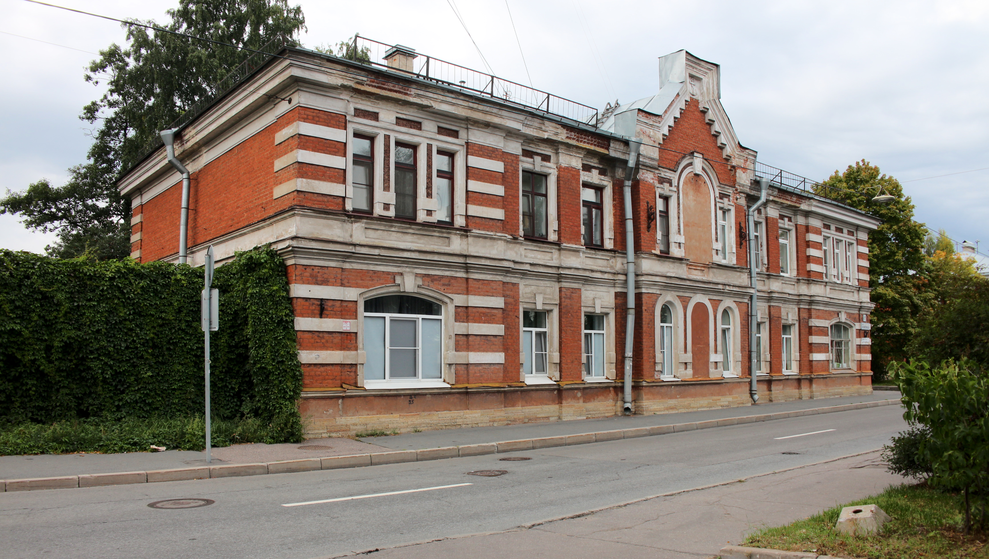 Жилой дом: улица Комсомола, 17, Кронштадт, Кронштадтский район, Санкт-Петербург